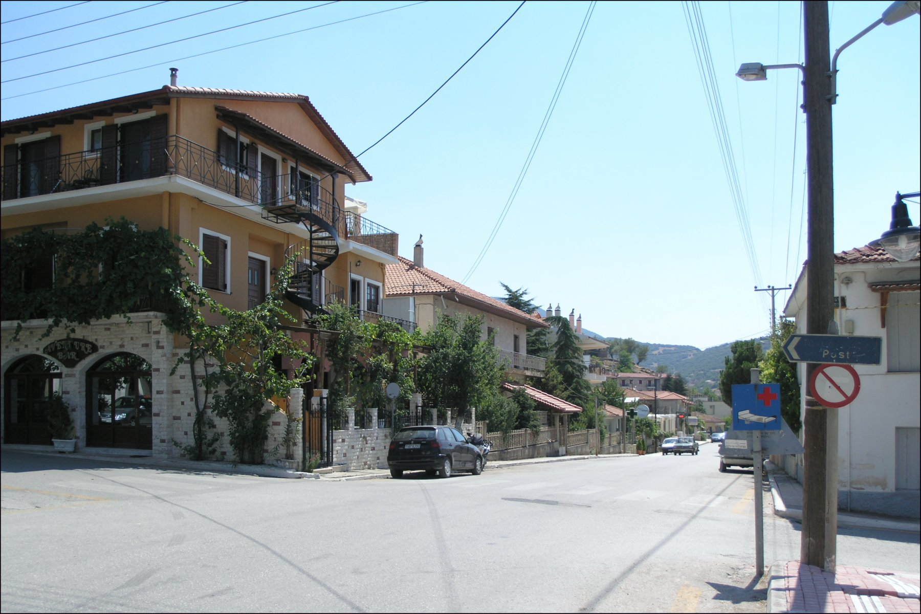 Greece, Kalavrita